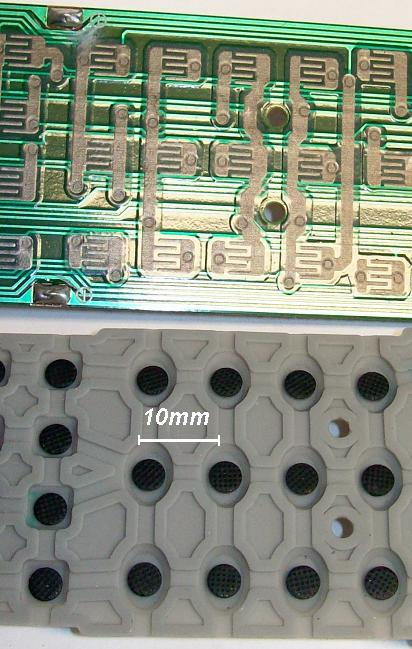 Leitgummi-Tasten an einer Fernbedienung: oben: Kontaktstrukturen; unten: Leitgummizylinder in nichtleitender Gummimatte. Diese liegt auf der Platine auf.